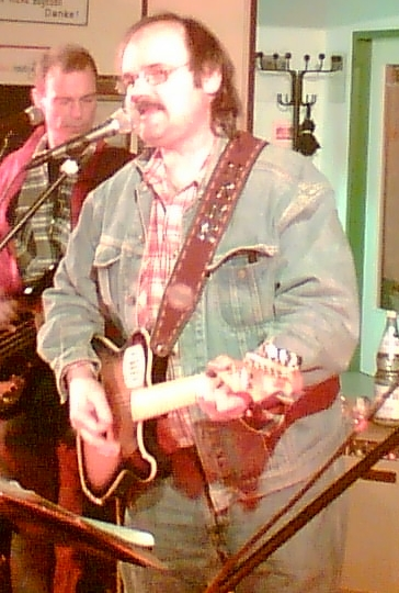 Hank Häberle am 24.05.2006 in Rommelshausen.